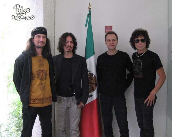 Héroes del Silencio posan con la bandera de México a su llegada al país.